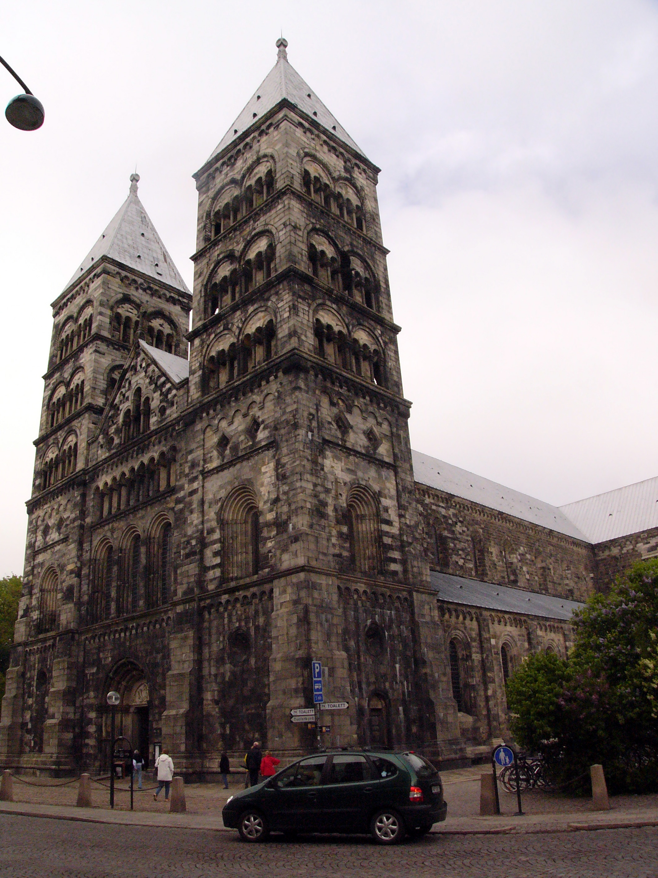 1103/04 errichtete Papst Paschalis II. auf dänische Initiative das Erzbistum Lund. Dom zu Lund.